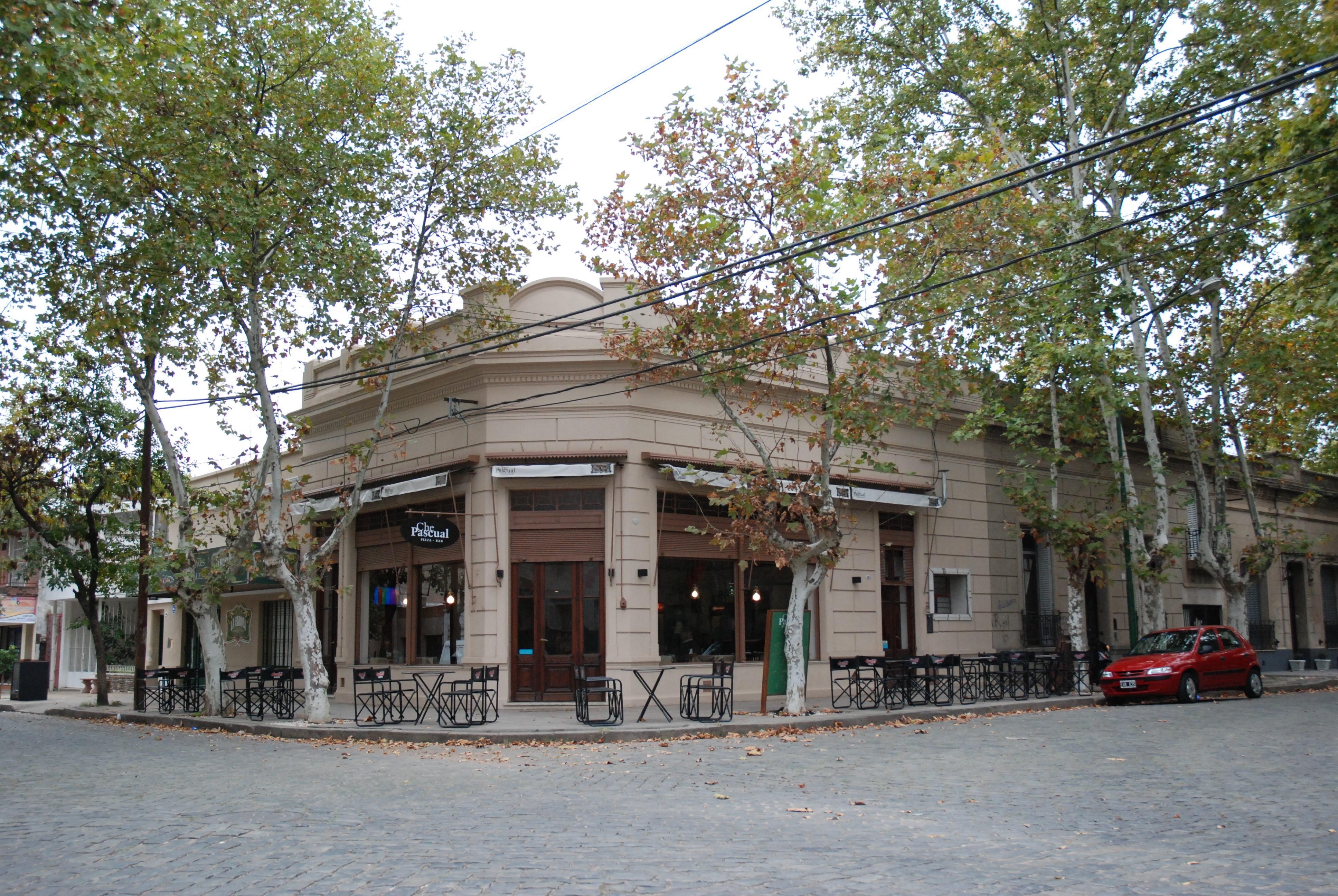 Esquina de las calles España e Italia en el Barrio Pueblo Nuevo. Junín, Argentina.